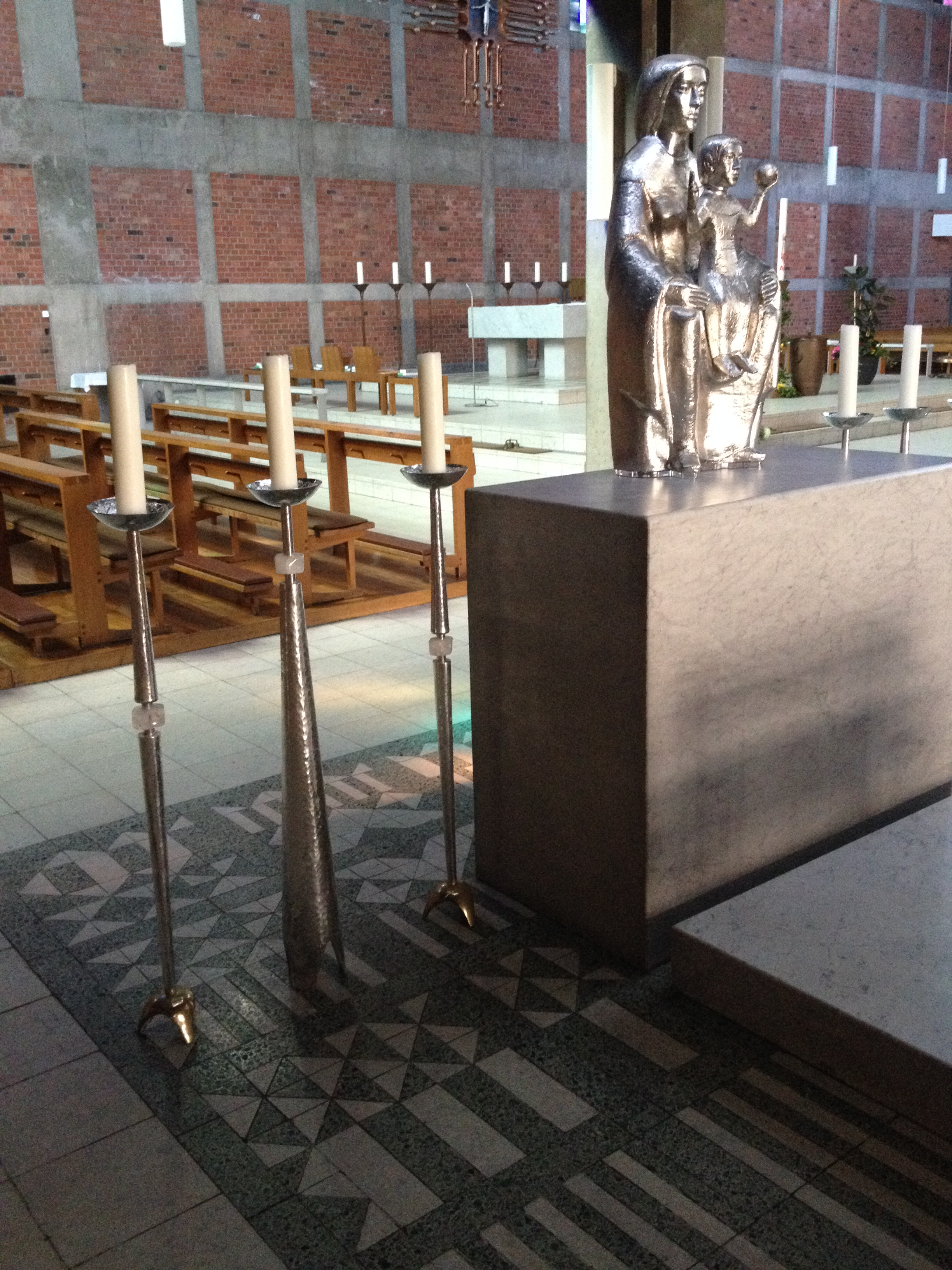 St. Antonius, Innenansicht, Marienaltar mit Leuchtern und Madonna aus St. Augustinus